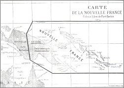 Advertising related to Marquis de Rays' La Nouvelle France